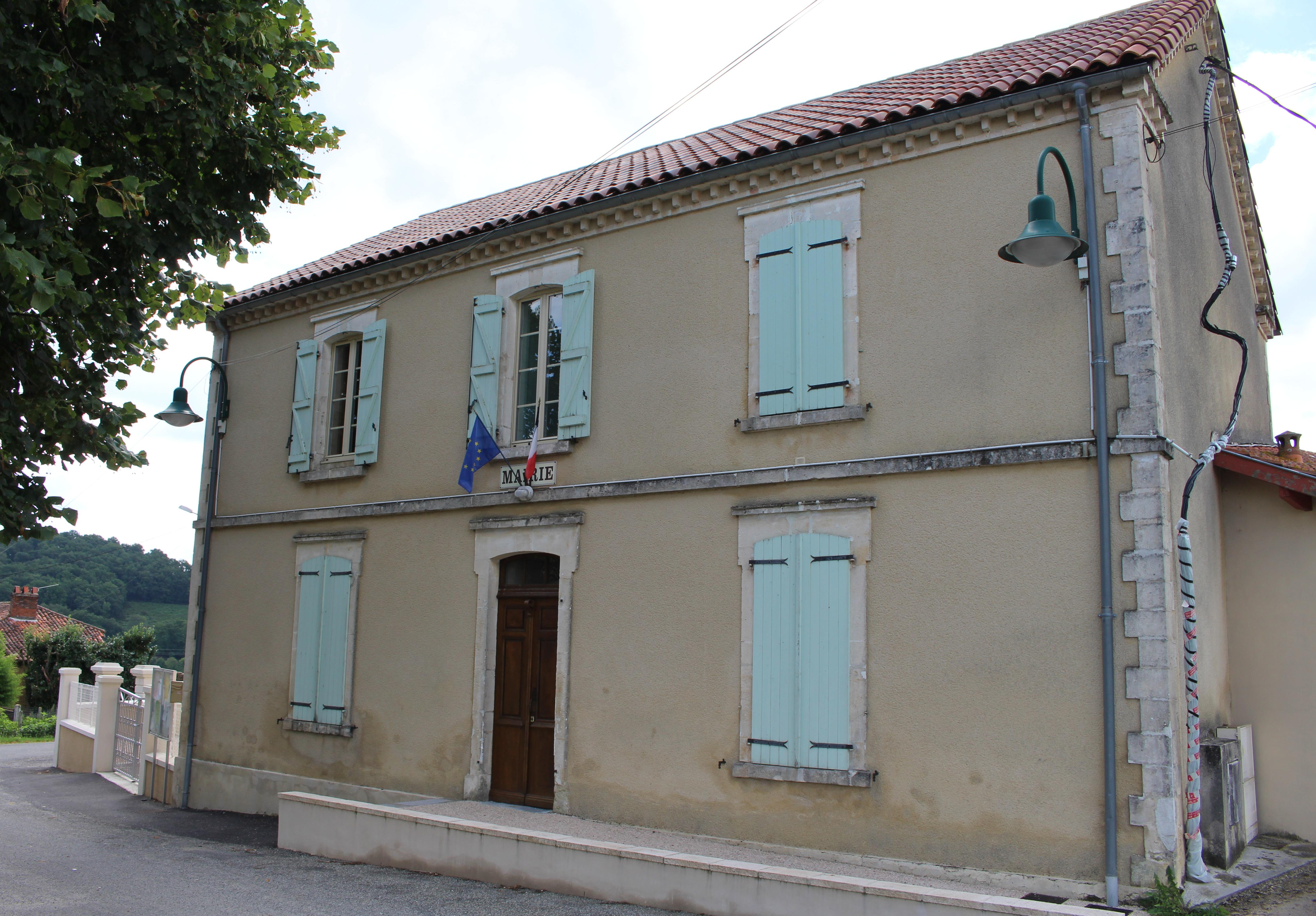 Mairie de Lamarque-Rustaing (Hautes-Pyrénées)